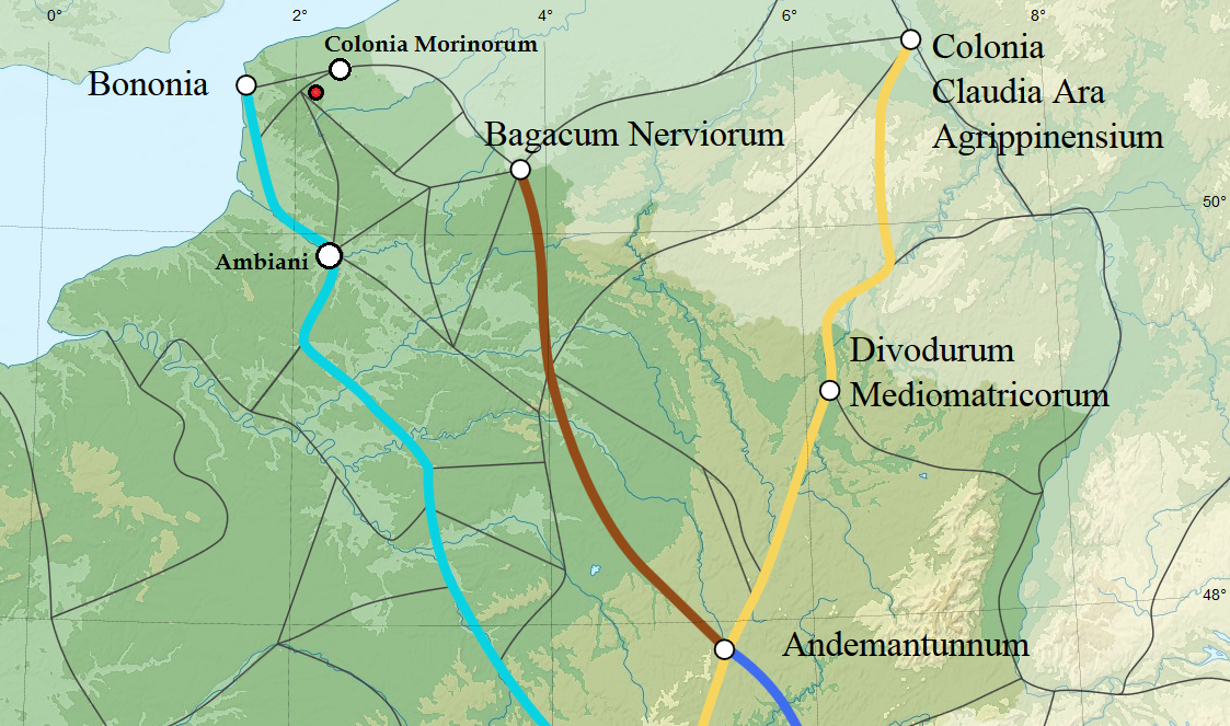 Ubicación de la localidad de Rentín (punto rojo) en la red vial romana de Belgica Ambiani = Amiens (Samarobriva); Bononia = Boulogne-sur-Mer (Gesoriacum); Colonia Morinorum = Tervanna (Thérouanne/Terwaan); Red mark = Renty Bagacum Nerviorum = Bavay/Beuken; Colonia Claudia Ara A. = Cologne/Köln; Divodurum M. = Metz; Andemantunnum = Langres Light blue: Road from Ludugnum (=Lyon) to Bononia = Western "Via Agrippa" Yellow: Road from Ludugnum (=Lyon) to Cologne = Eastern "Via Agrippa" Road from Cologne to Bononia (via Bagacum and Colonia Morinorum) = Northern route of the "Via Belgica" Bononia = Roman Channel Fleet Headquarter